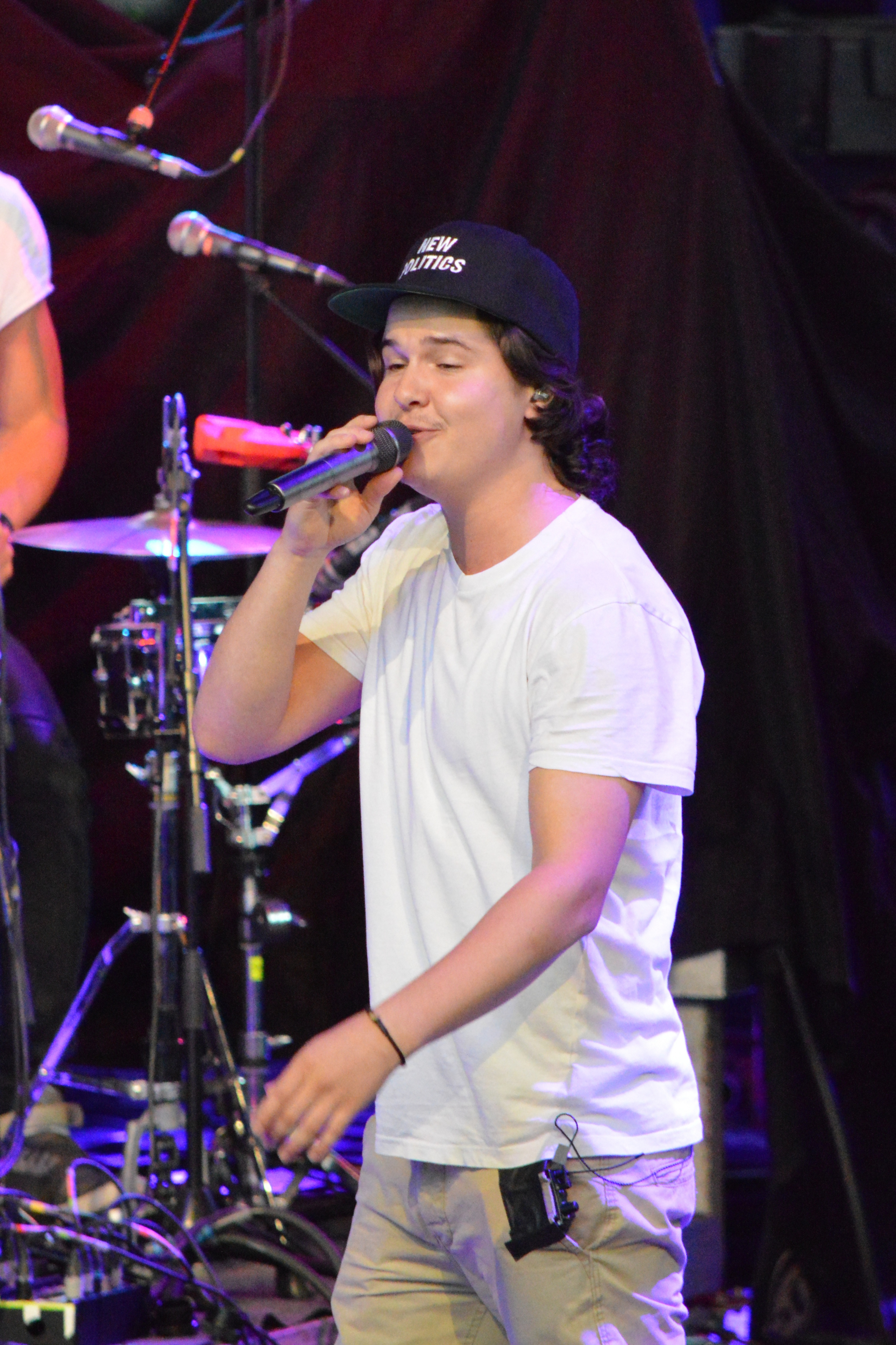 Lukas Graham Forchhammer, Sänger der Band Lukas Graham, beim Traumzeit-Festival 2013